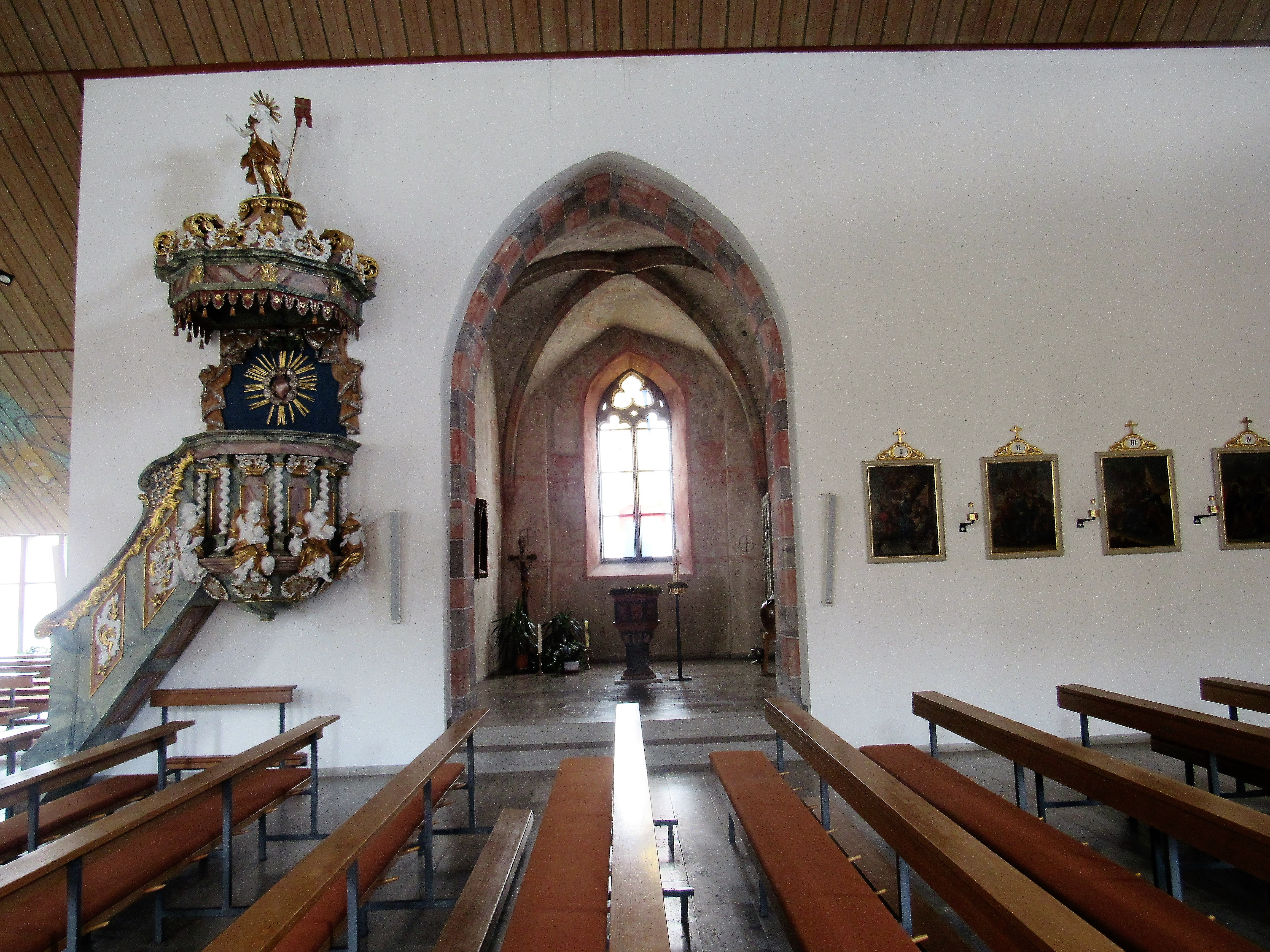 Langhaus mit altem Chor